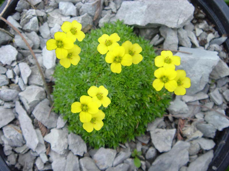 Draba rigida var. imbricata